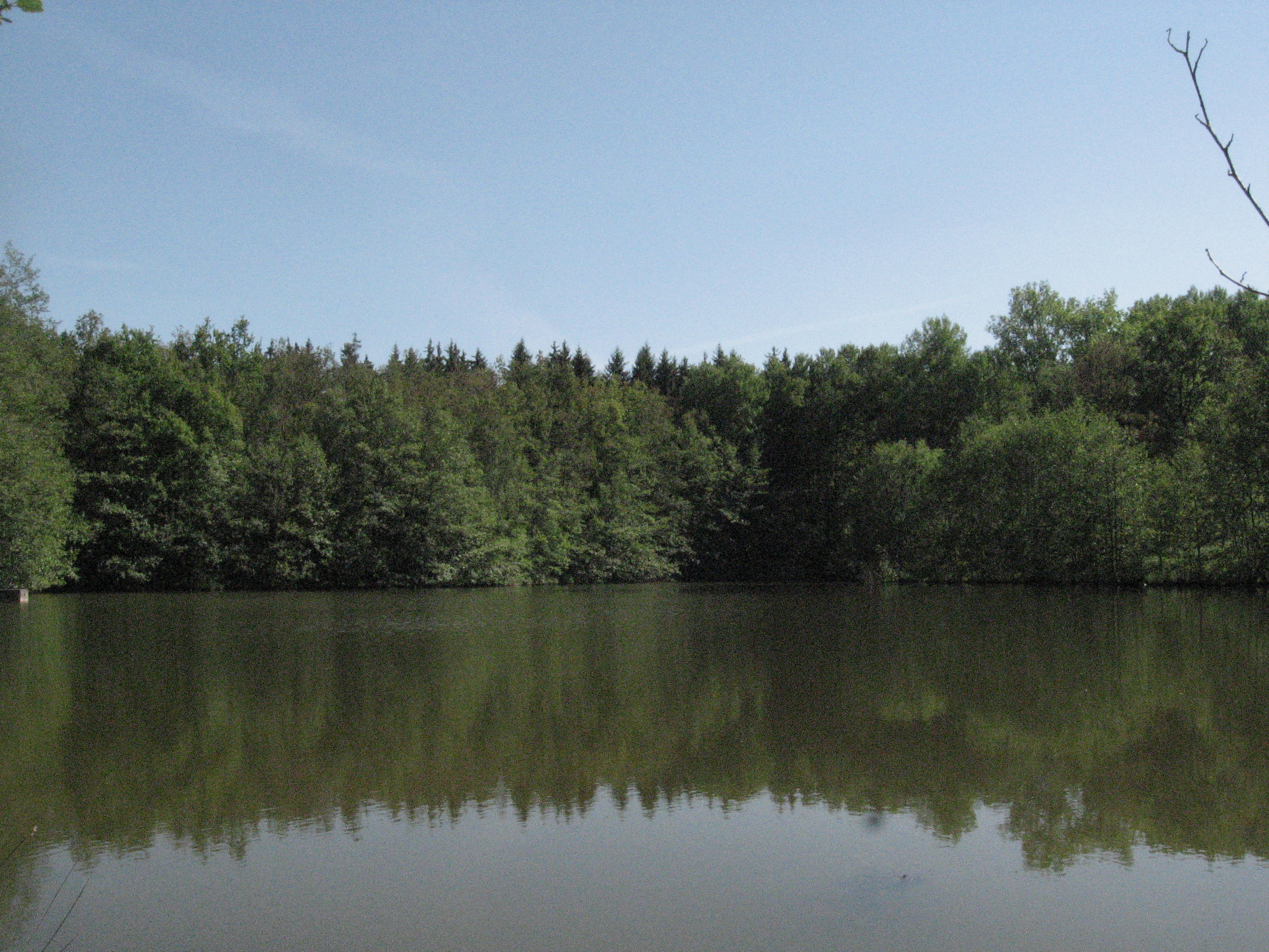 Der Bombensee in einer Lichtung Im Spöck an der oberen Fischach. Blick nach S vom Nordufer.